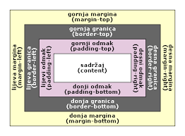 IZGLED CSS BOX MODELA